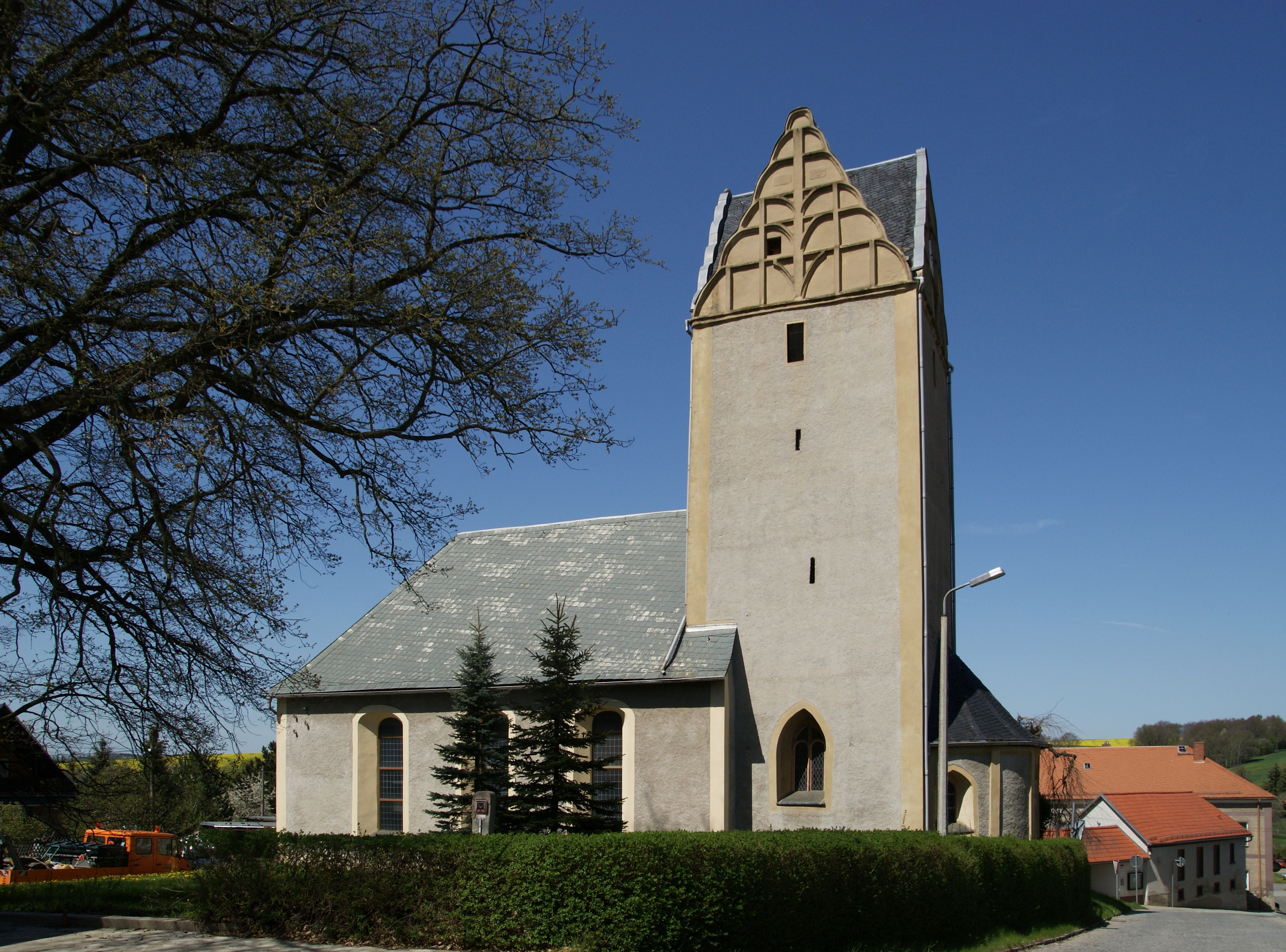 Kirche in Wolfersdorf, Stadtteil von Berga/Elster